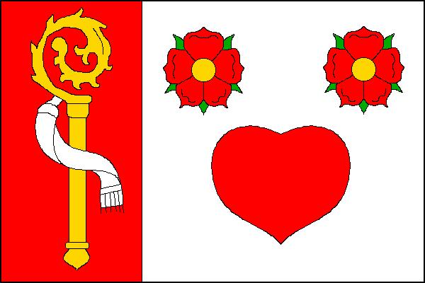 Vlajka obce Světlá